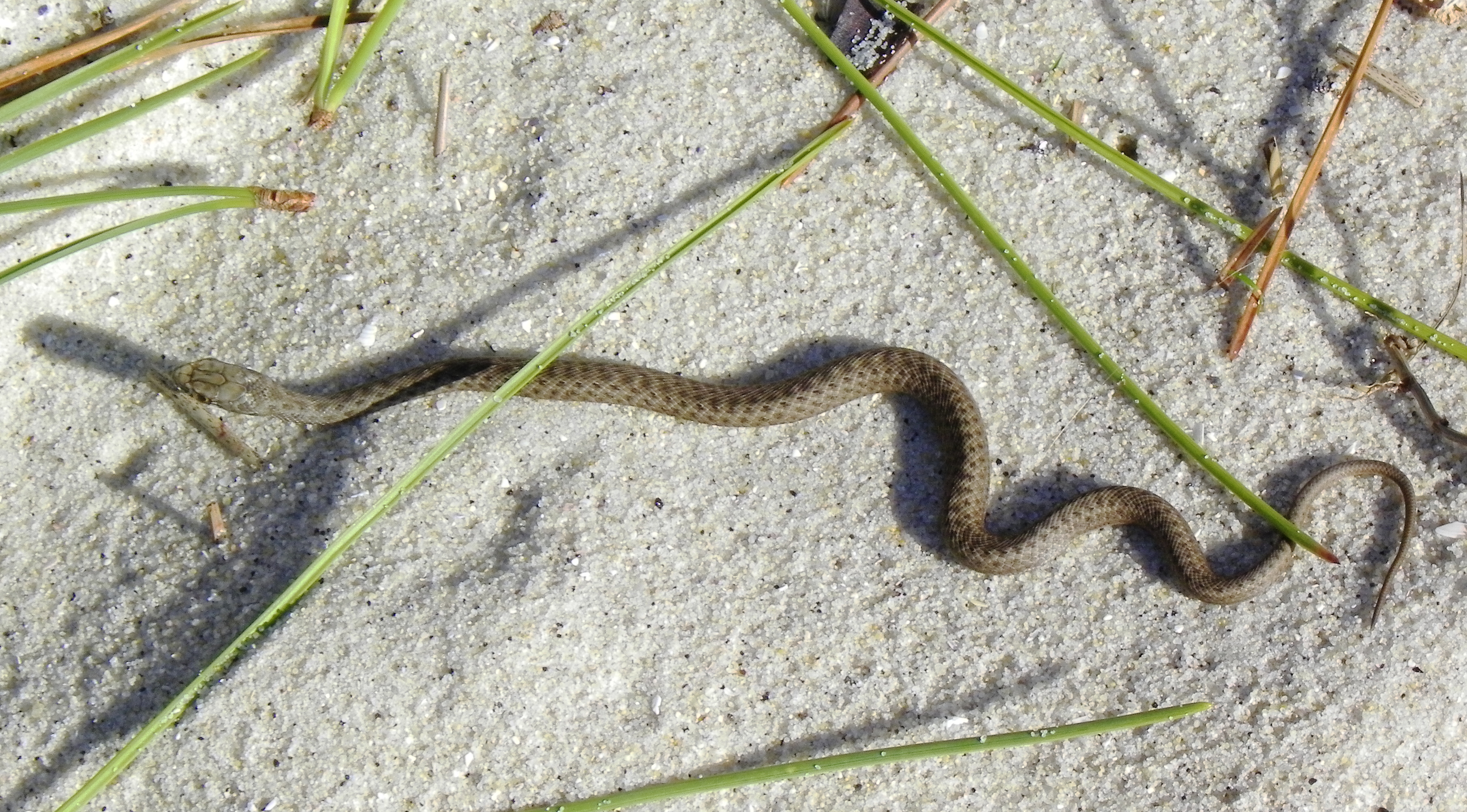 Juvenil de Culebra bastarda en la Costa da Vela This is a photography of a Site of Community Importance in Spain with the ID: ES1140010. Natura2000 entry, EEA entry